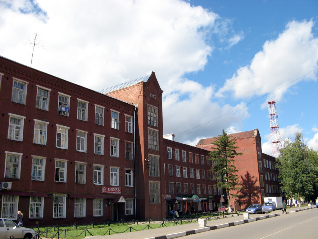 Казарма в Дедовске - временное жилище для работников прядильно-ткацкой фабрики, в котором живет уже четвертое поколение сотрудников фабрики.